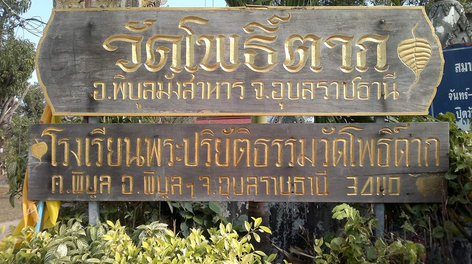 วัดโพธิ์ตาก และ โรงเรียนพระปริยัติธรรม